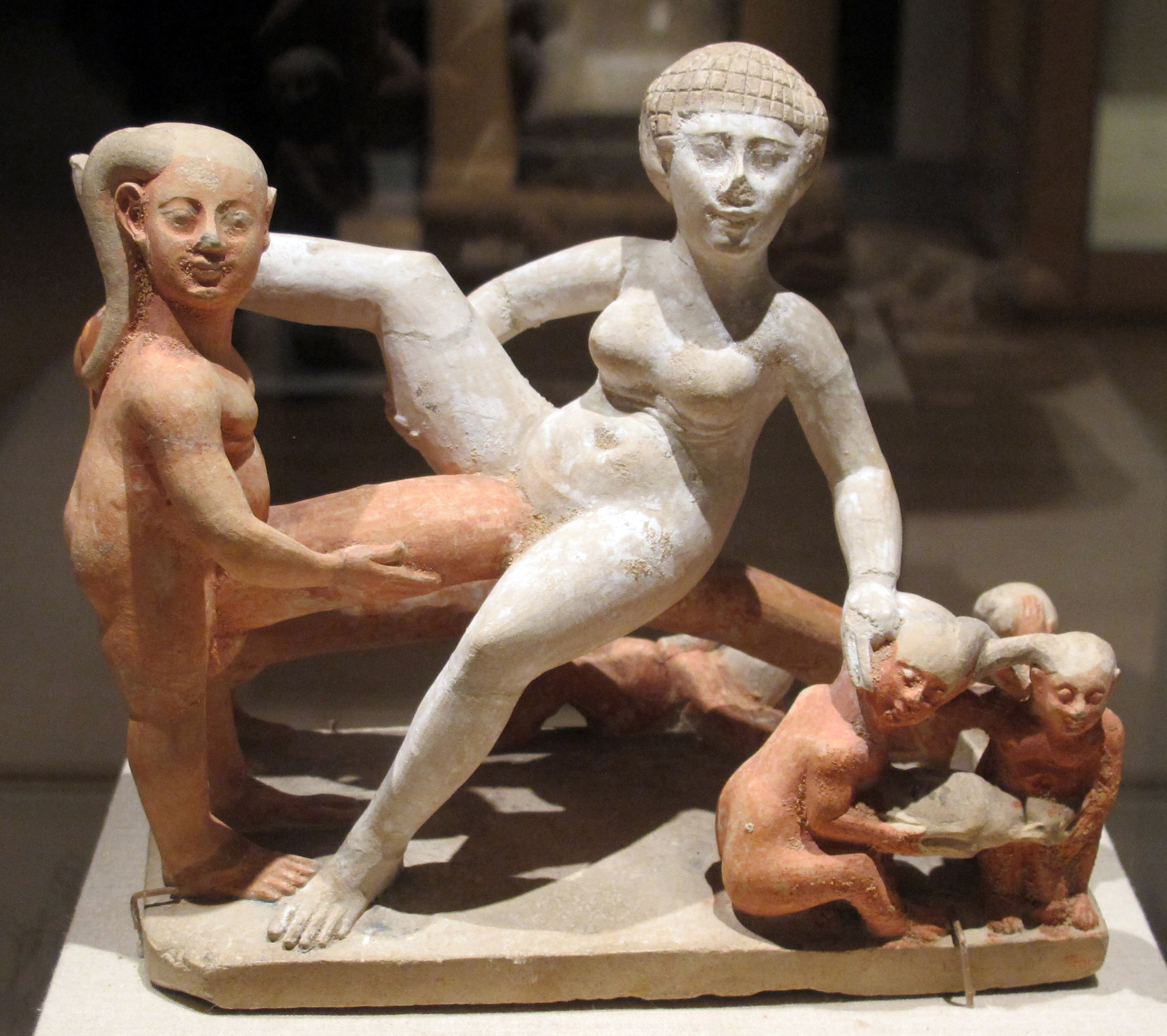 Egyptian antiquities in the Brooklyn Museum